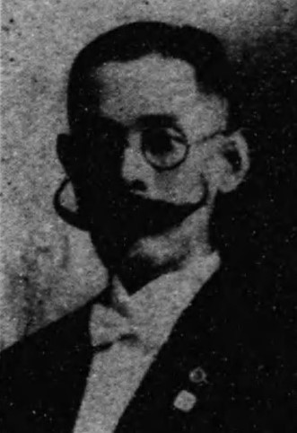 松田正一（1884～1972）